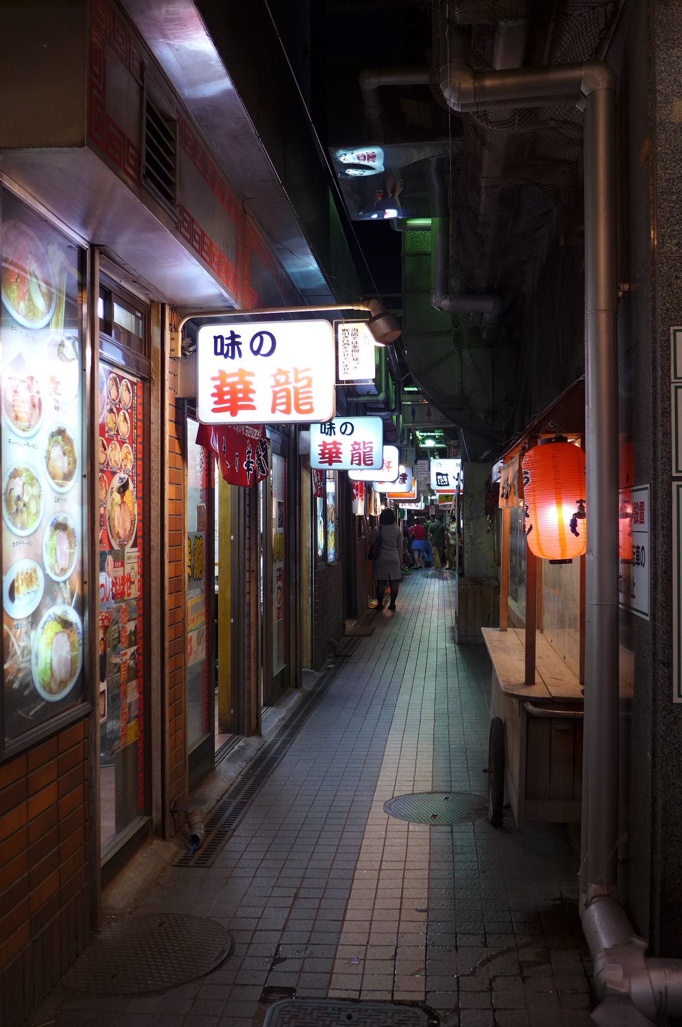 Sapporo Raumen Yokocho